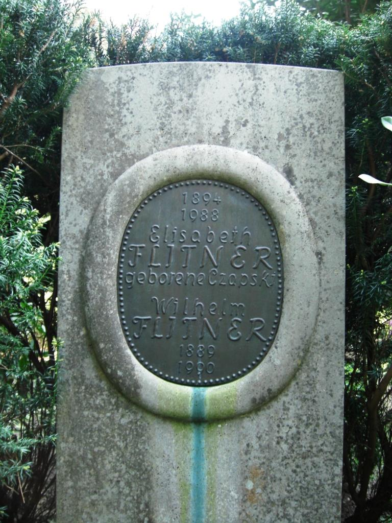 Grab des Pädagogen Wilhelm Flitner (1889-1990), Hamburg-Nienstedten, Friedhof